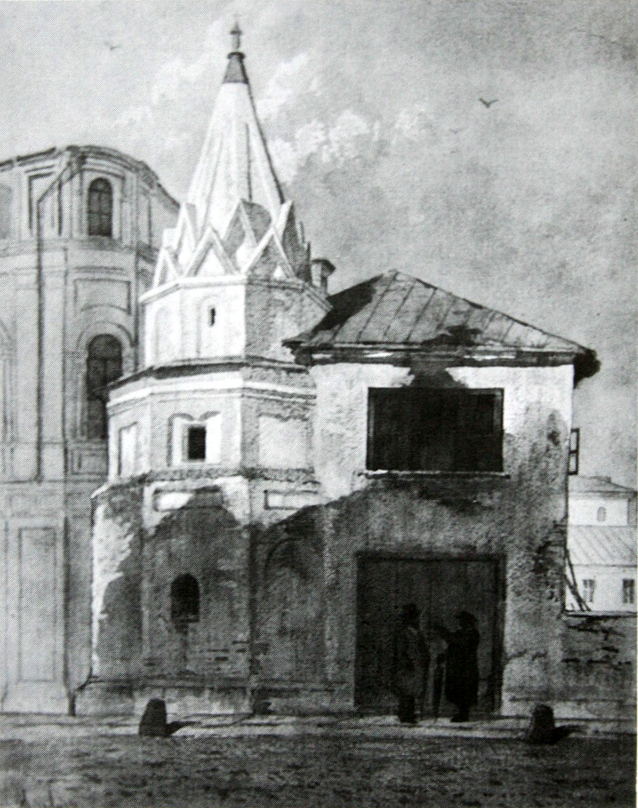 Богоявленский монастырь Китай-города. Крепостная башня ограды XVII века. Рисунок академика Нисевина. 1871 г.